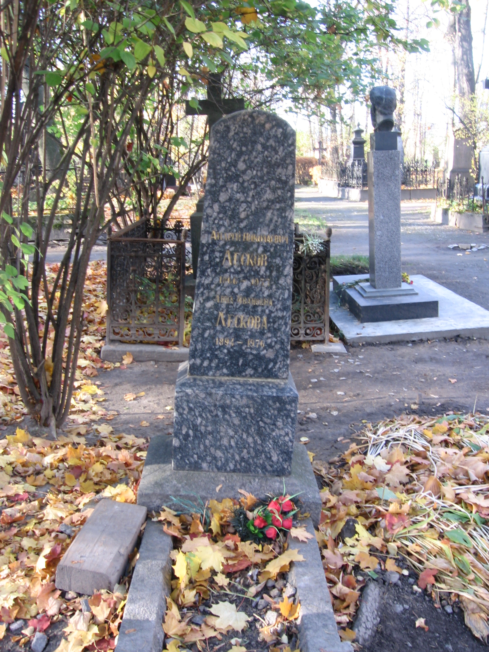 Надгробие А. Н. Лескова и А. И. Лесковой на Литераторских мостках